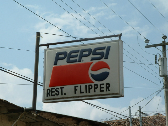 Sign for Restaurante "Flipper" in Sololá, Guatemala.